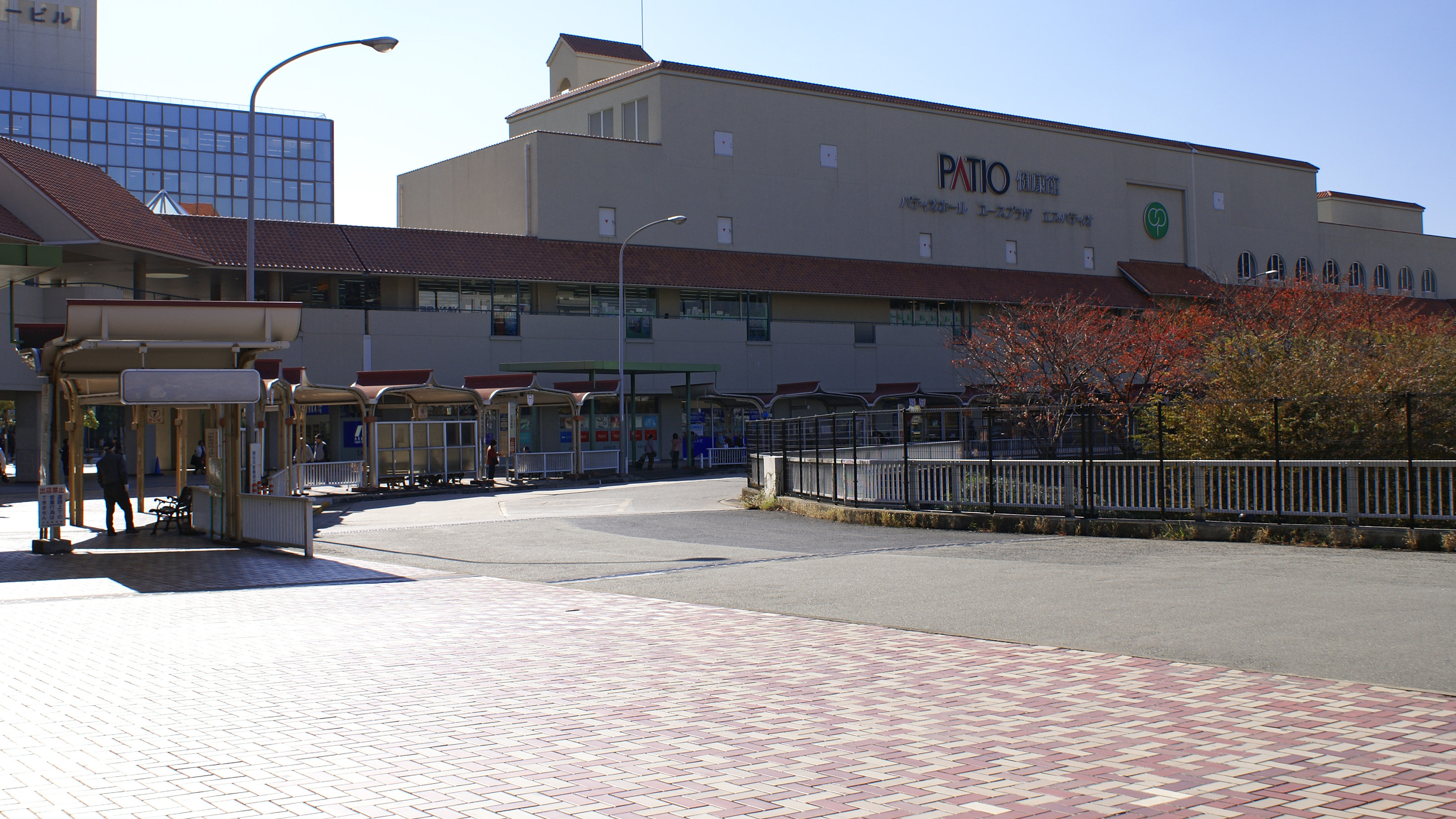 Myodani Station in Kobe, Hyogo, Japan